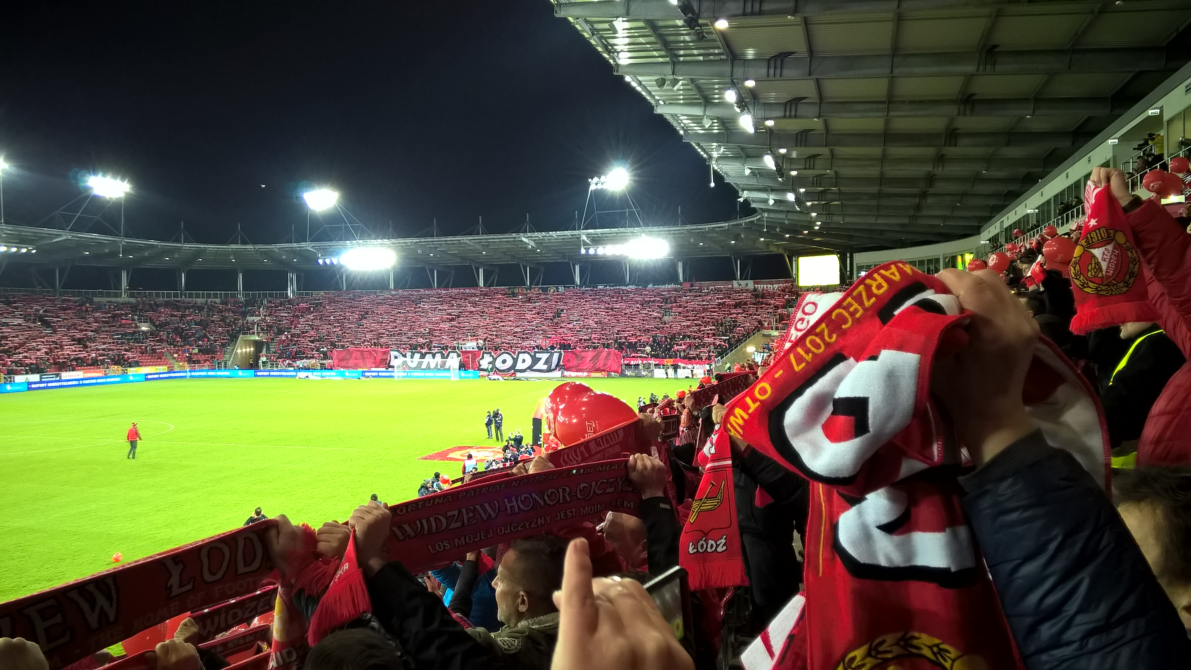 Otwarcie stadionu Widzewa - 18.03.2017